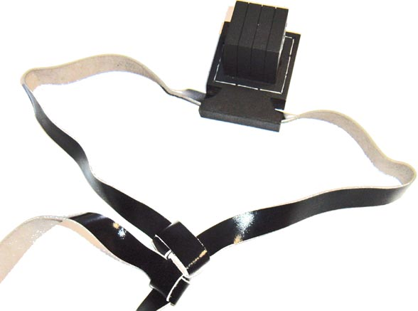 Tfilin shel rosh